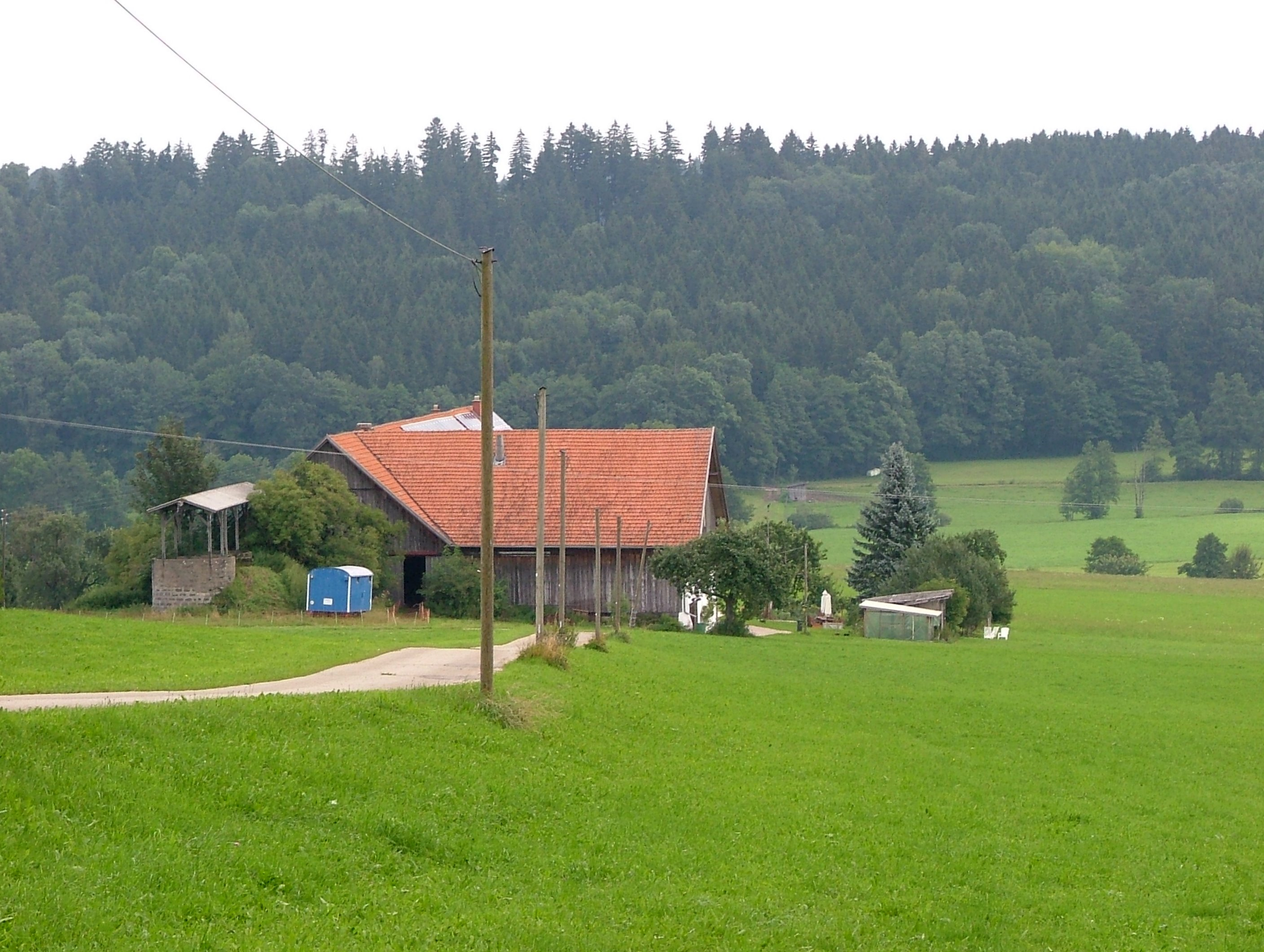 Schochen